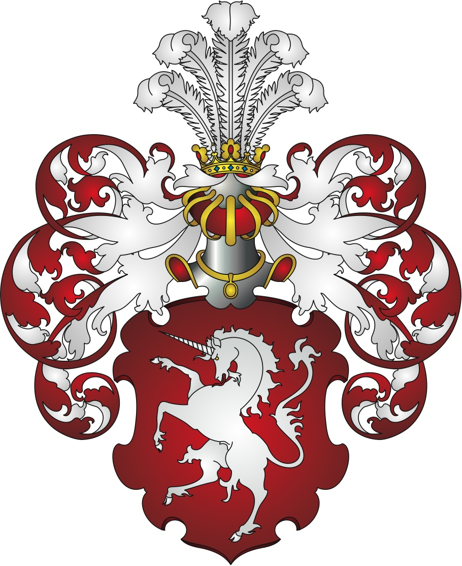 Герб "Осмоловский", прошедший регистрацию в Черниговском Дворянском депутатском собрании. Изображение было приготовлено для книги "500 лет рода Бонч-Осмоловских" М.А. Бонч-Осмоловской